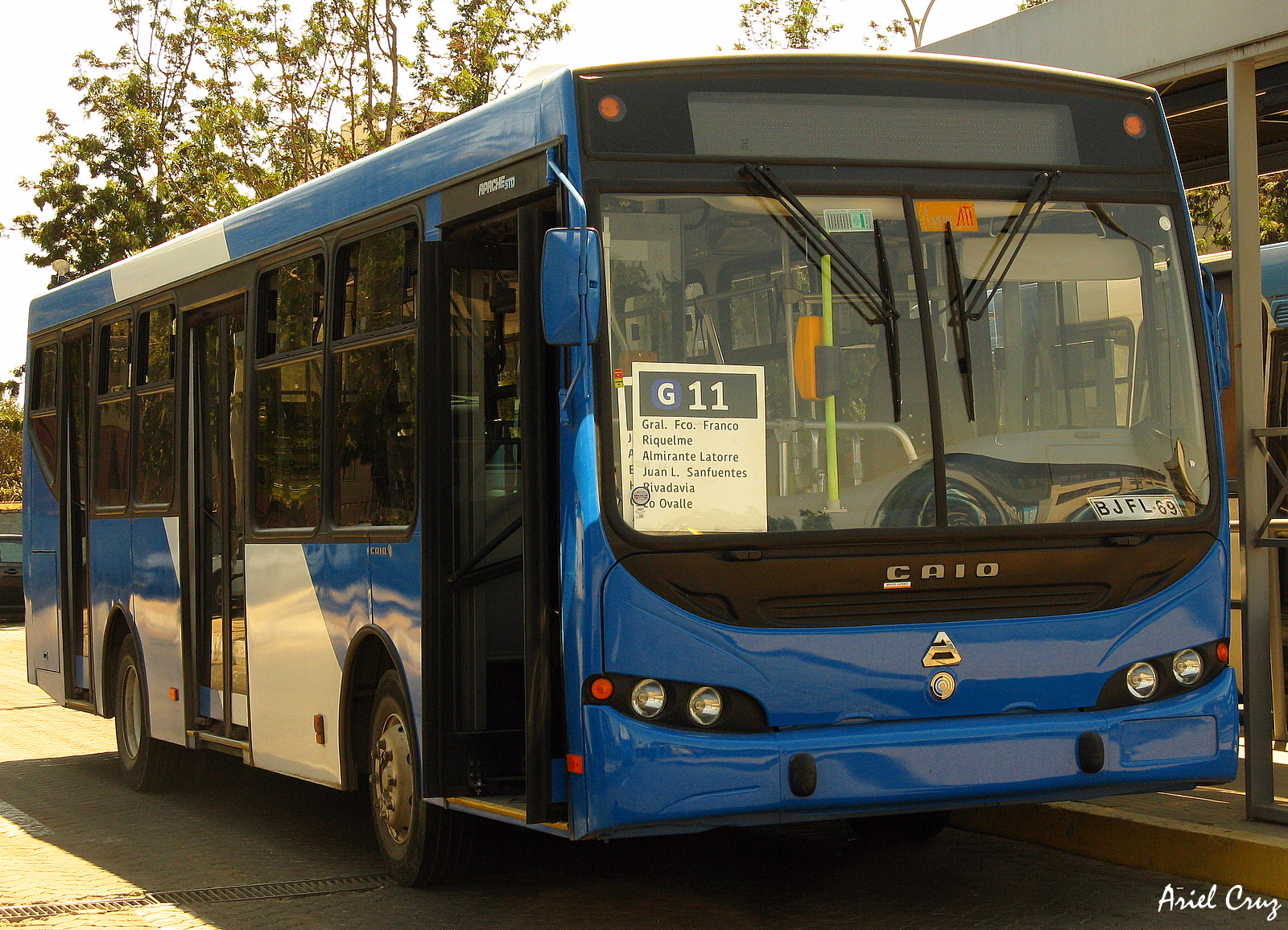 Bus rígido nuevo del recorrido G11 Lo Blanco - EIM Lo Ovalle